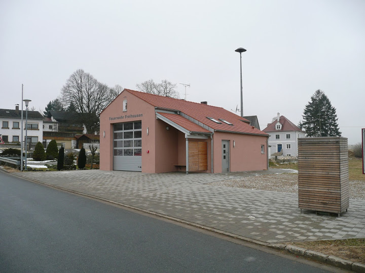 Feuerwehrhaus